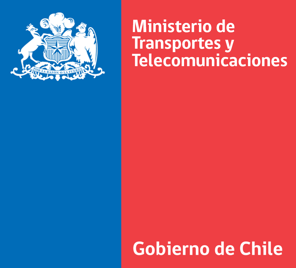 Logo del Ministerio de Transportes y Telecomunicaciones.